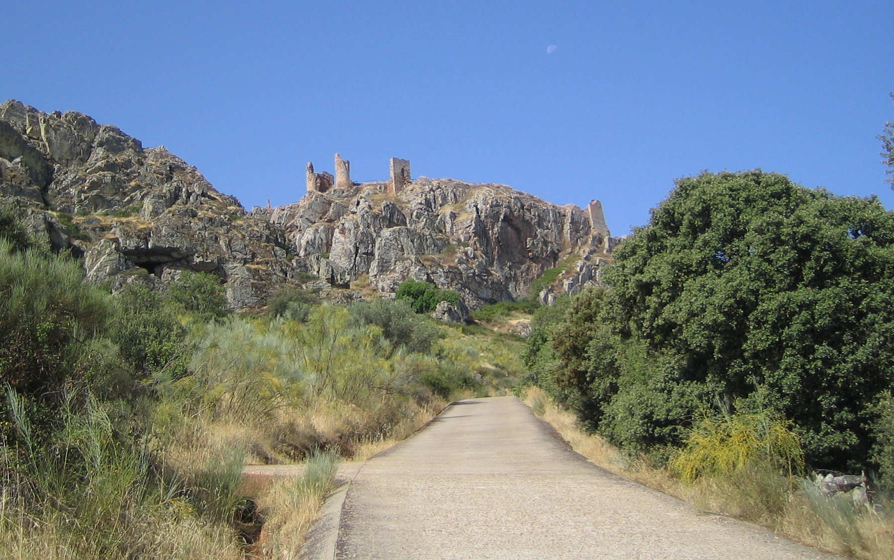 Benquerencia de la Serena _ Castillo